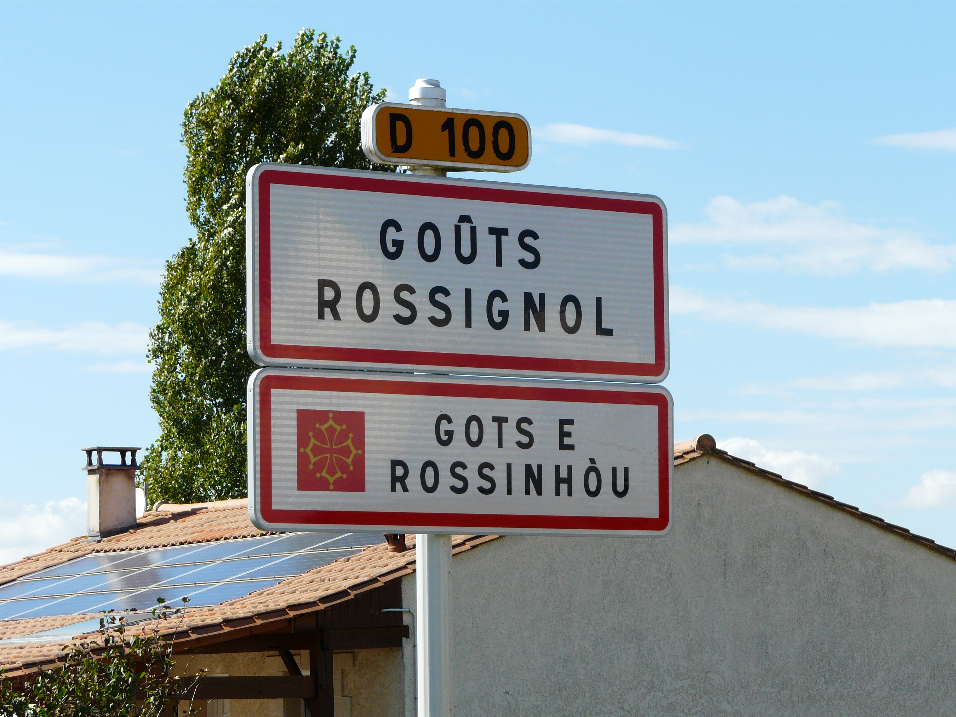 Panneau en français et occitan, Gout-Rossignol, Dordogne, France.